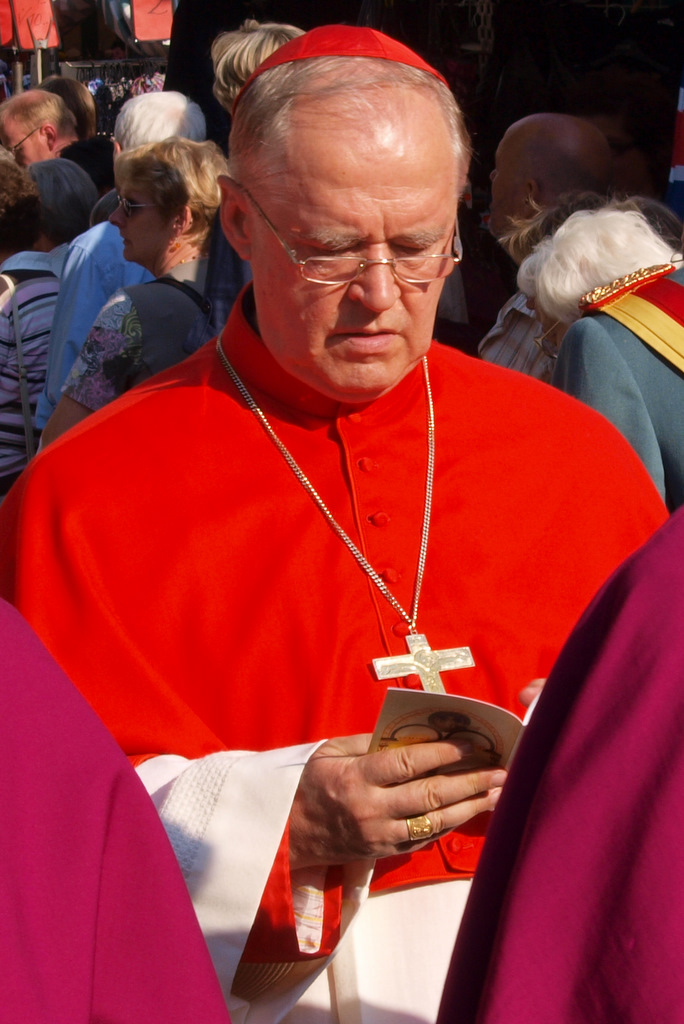 Paul Josef Cardinal Cordes beim Liborifest in Paderborn